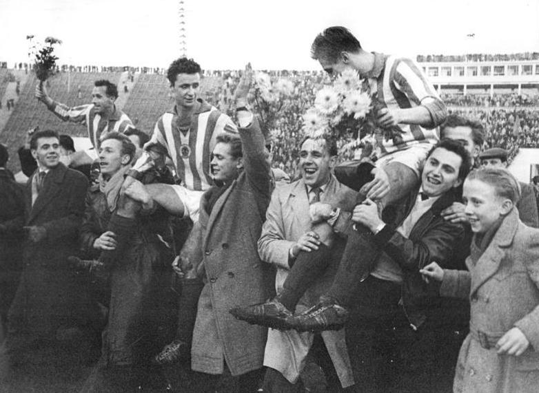 Zentralbild-Schaar Wen-Noa 29.11.1959 Neuer deutscher Fußballmeister: SC Wismut - Durch ihren 2:0-Erfolg über Lok Leipzig am 29.11.1959 im Leipziger Zentralstadion konnte der SC Wismut Karl-Marx-Stadt sich den Titel eines deutschen Fußballmeisters wieder zurücksichern. UBz. Auf den Schultern von begeisterten Wismut-Anhängern werden (v.l.) Wolf, Erler und Müller vom Platz getragen.